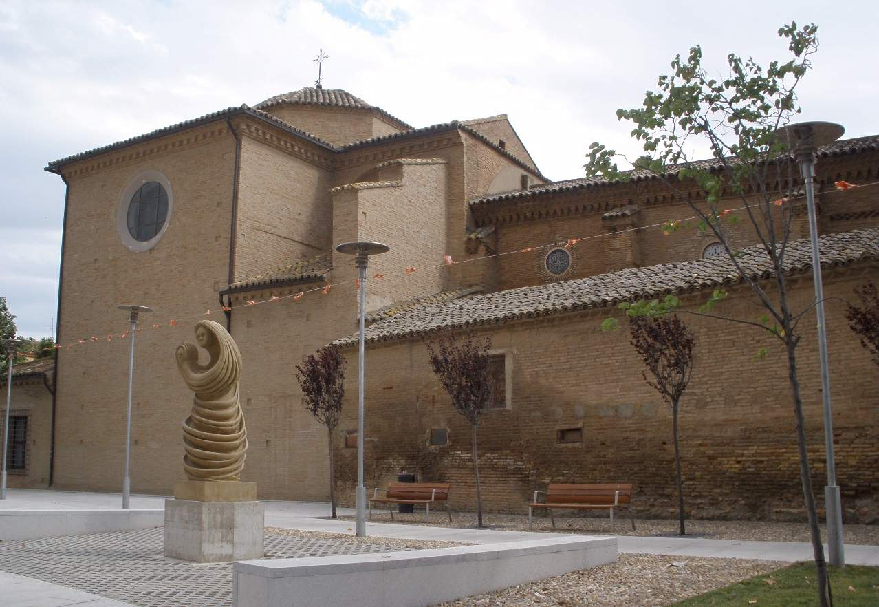 Utebo - Iglesia de Nuestra Señora de la Asunción